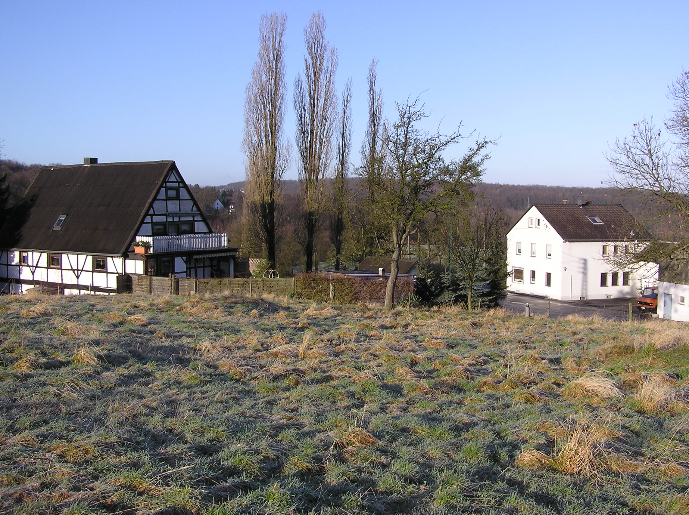 Velbert, Hefel, Bauernhof, Rottberg